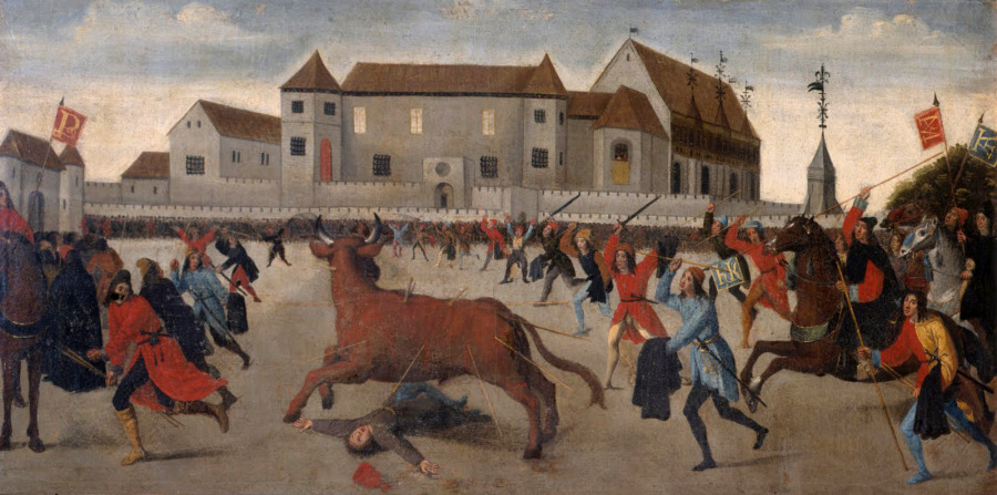 Cuadro anónimo "Corrida de toros en Benavente en honor de Felipe el Hermoso". Ubicación: Chateau de la Follie Bélgica (Propiedad privada). Una copia se encuentra en el ayuntamiento de Benavente